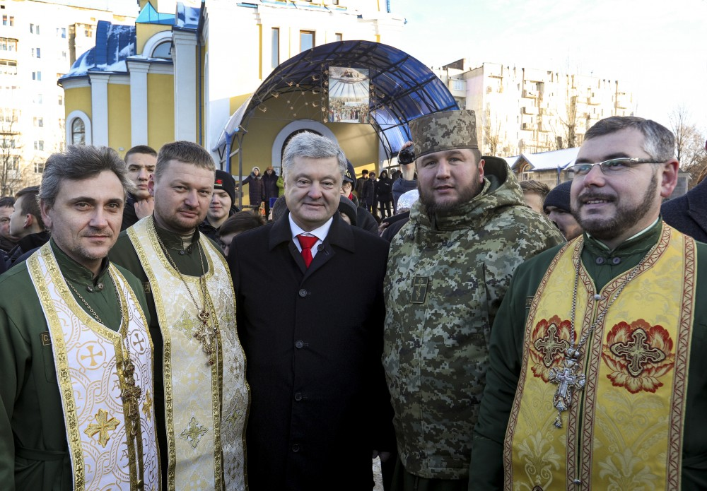 Капелани УПЦ КП та президент України Петро Порошенко